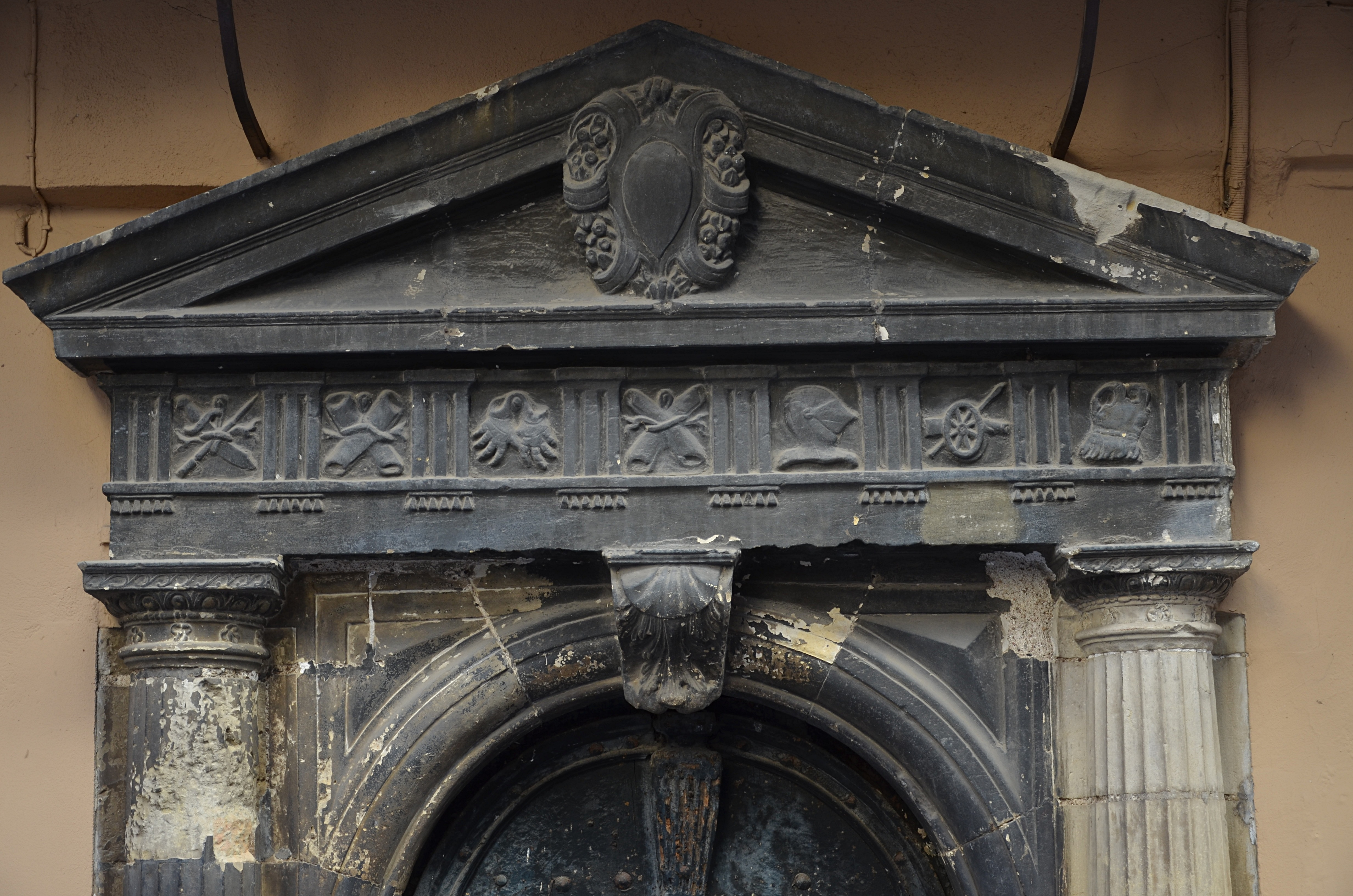 Castres (Tarn) - maison, 31 rue de l'hôtel de ville, porte : détail .